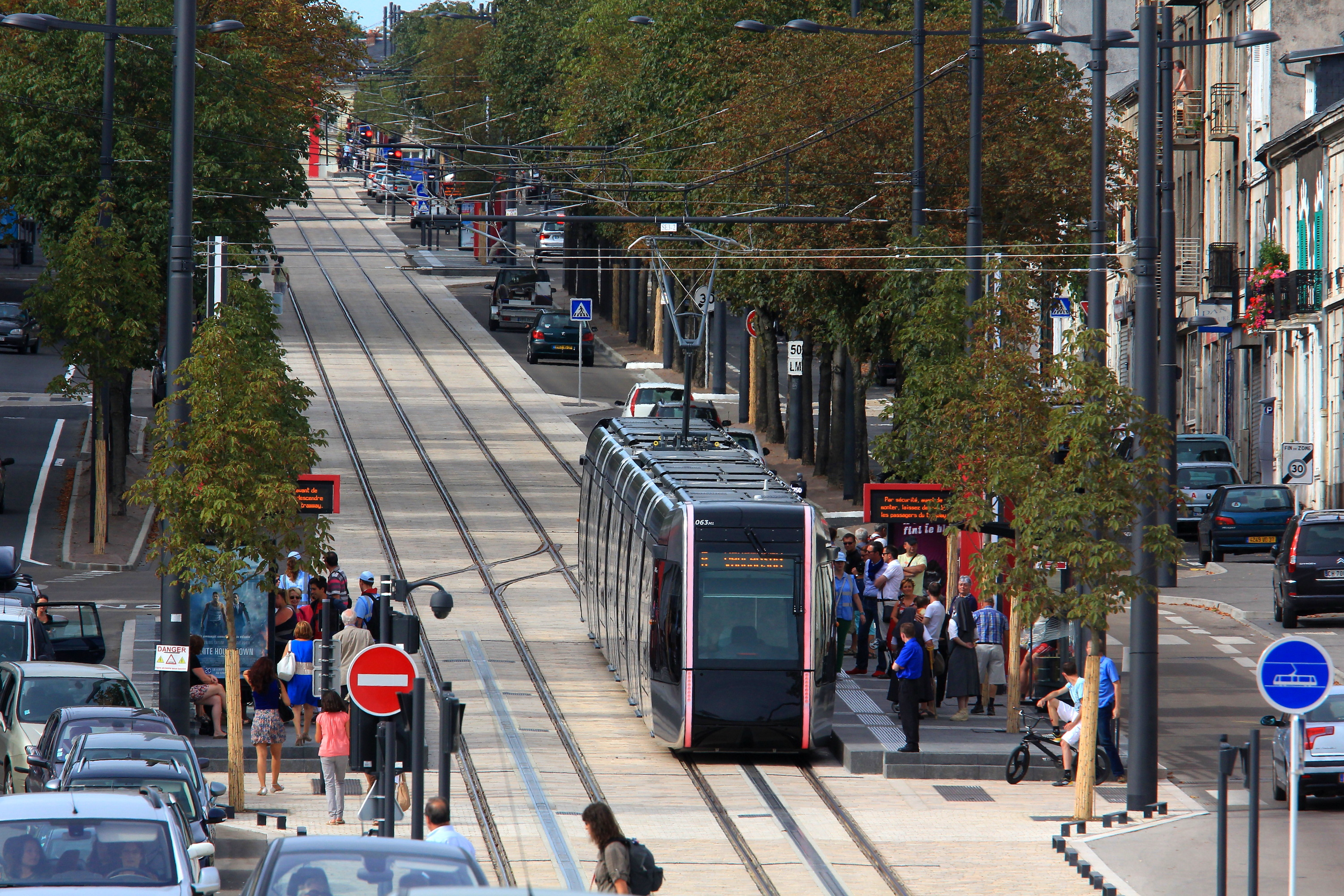 La rame du tramway de Tours n°63 à l'arrêt "Place Choiseul".